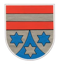 Wappen von Ney (Hunsrück)